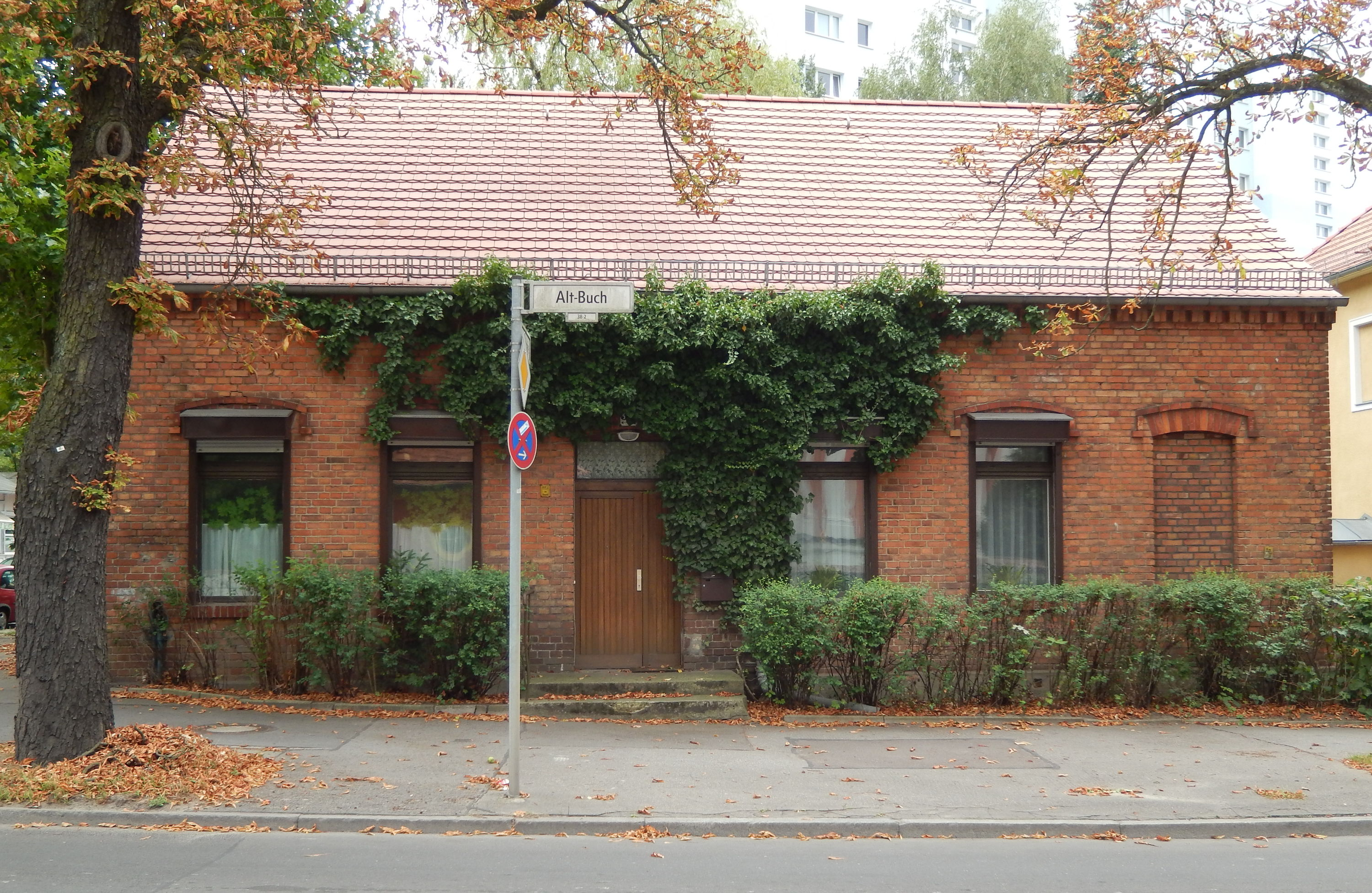 Küsterhaus Alt-Buch 38 in Berlin-Buch, anstelle eines Vorgängerbaus 1886 errichtet, bis 1903 zugleich die Dorfschule, dann ein Wohnhaus